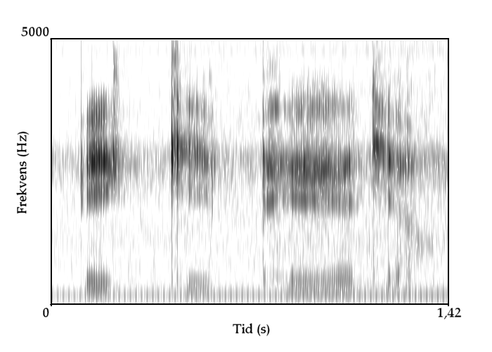 Spektrogram av /ʋɪkɪpheːdja/.